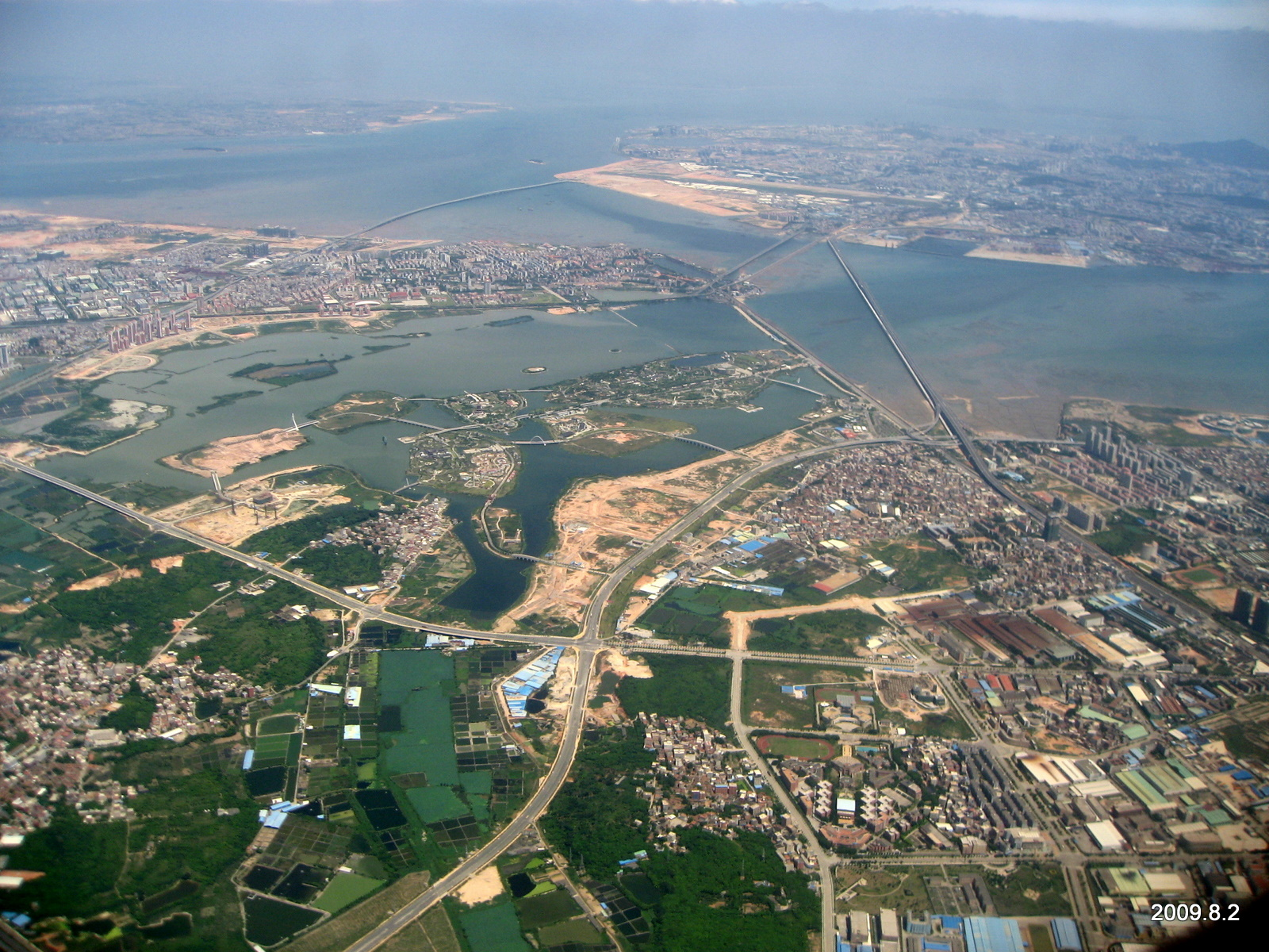 厦门集美区上空，右前方是园博苑